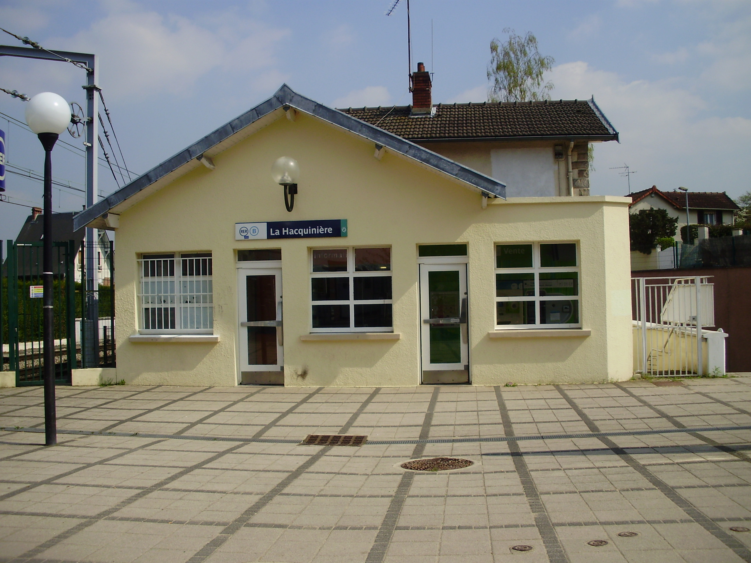 Gare de La Hacquinière, à Bures-sur-Yvette, Essonne, France (face ouest du bâtiment voyageurs)